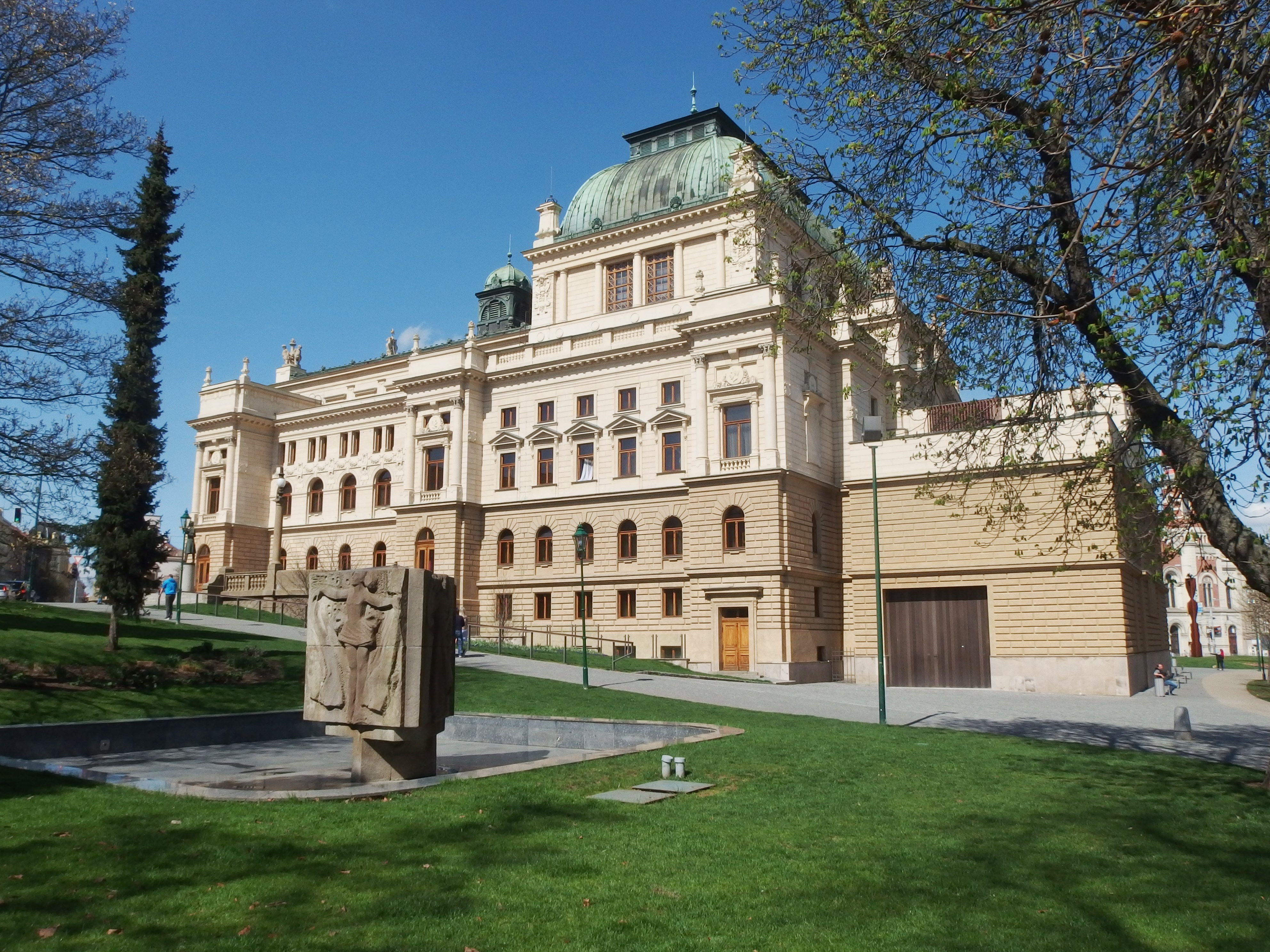 Divadlo J. K. Tyla, Plzeň 3-Jižní Předměstí, Smetanovy sady 1129/16, Plzeň.